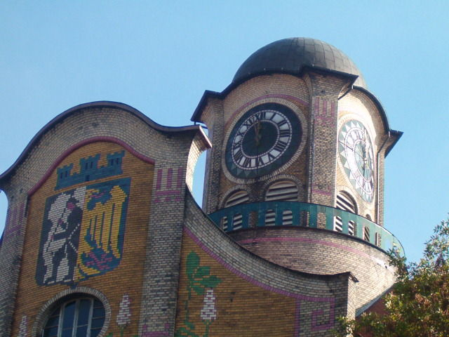 Wieża zegarowa IV LO w Bytomiu